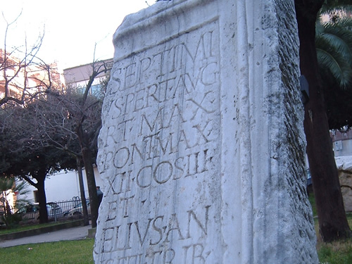 Inscripción honoraria romana procedente de Canosa di Puglia (Italia, correspondiente con AE 1969/70, 135: [Imp(erator) Caes(ar) L(ucius)] Septimi/[us Severus Pi]us Pert(inax) Aug(ustus) / [Arab(icus) Adiab(enicus) P]art(hicus) max(imus) / [Britannic(us) ma]x(imus) pont(ifex) max(imus) / [trib(unicia) pot(estate) XVIII im]p(erator) XII co(n)s(ul) III / [p(ater) p(atriae) proco(n)s(ul)] et / [Imp(erator) Caes(ar) M(arcus) Au]relius An/[toninus Aug(ustus) Pi]us Fel(ix) trib(unicia) / [pot(estate) XIII co(n)s(ul) III p(ater) p(atriae)/ ---- funda]menta(?) ar/[cus ---]um pon/[tem --- vi flu]mi/[nis]